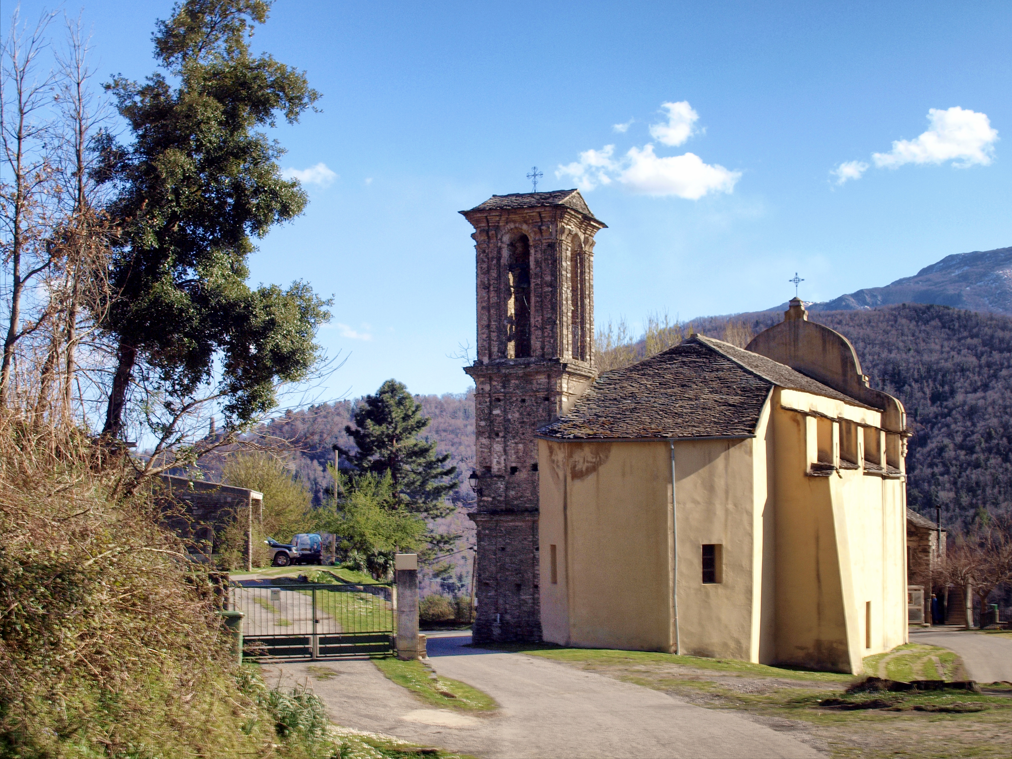 Nocario, Castagniccia (Corse) - Église Saint-Michel